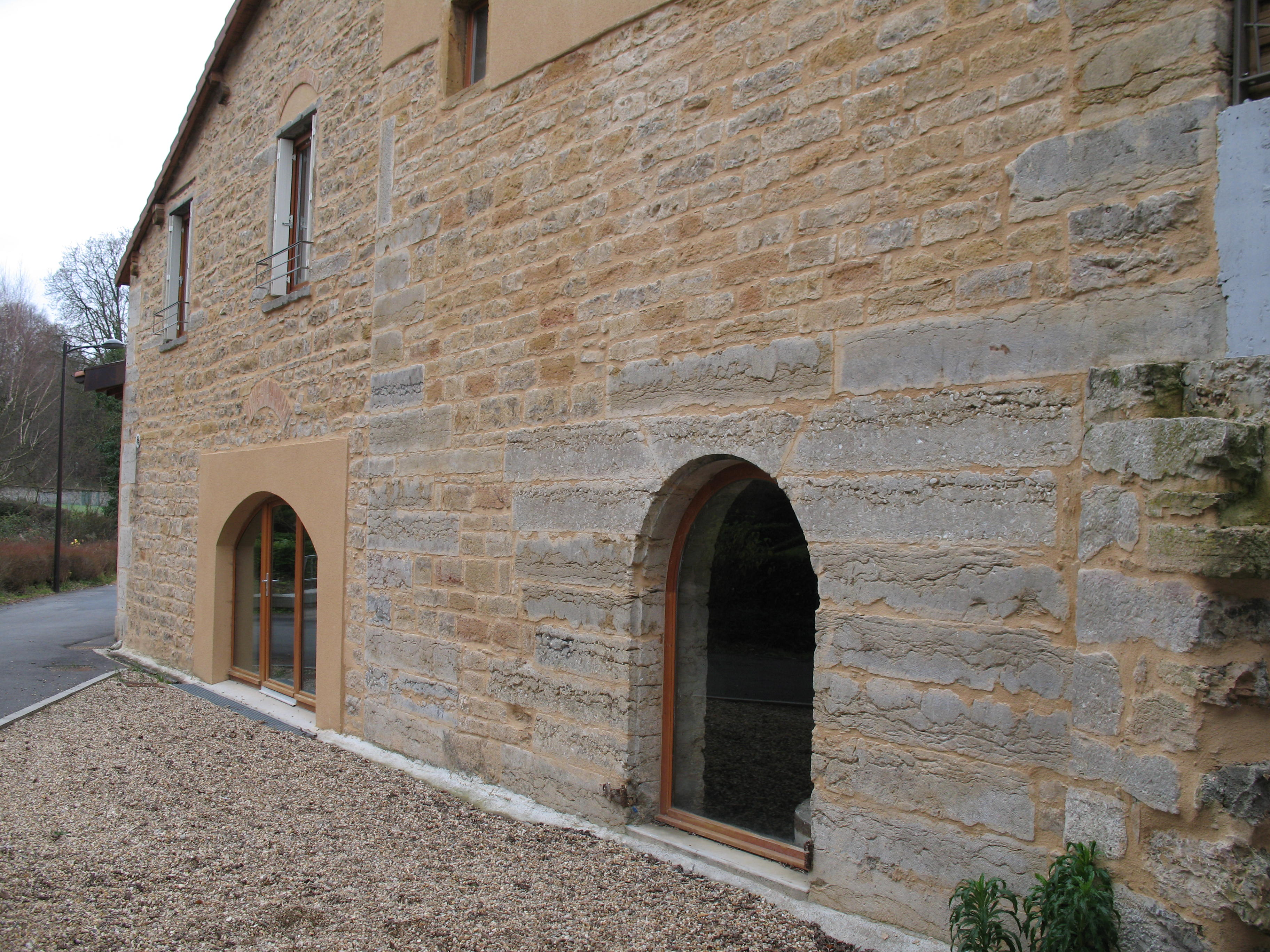 Moulin de Fontaines-Saint-Martin, dans le Rhône, où vécut Joseph Anthelme Sève, dit Soliman Pacha